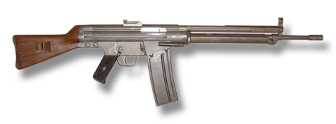 Sturmgewehr CETME A2b (Spanien)